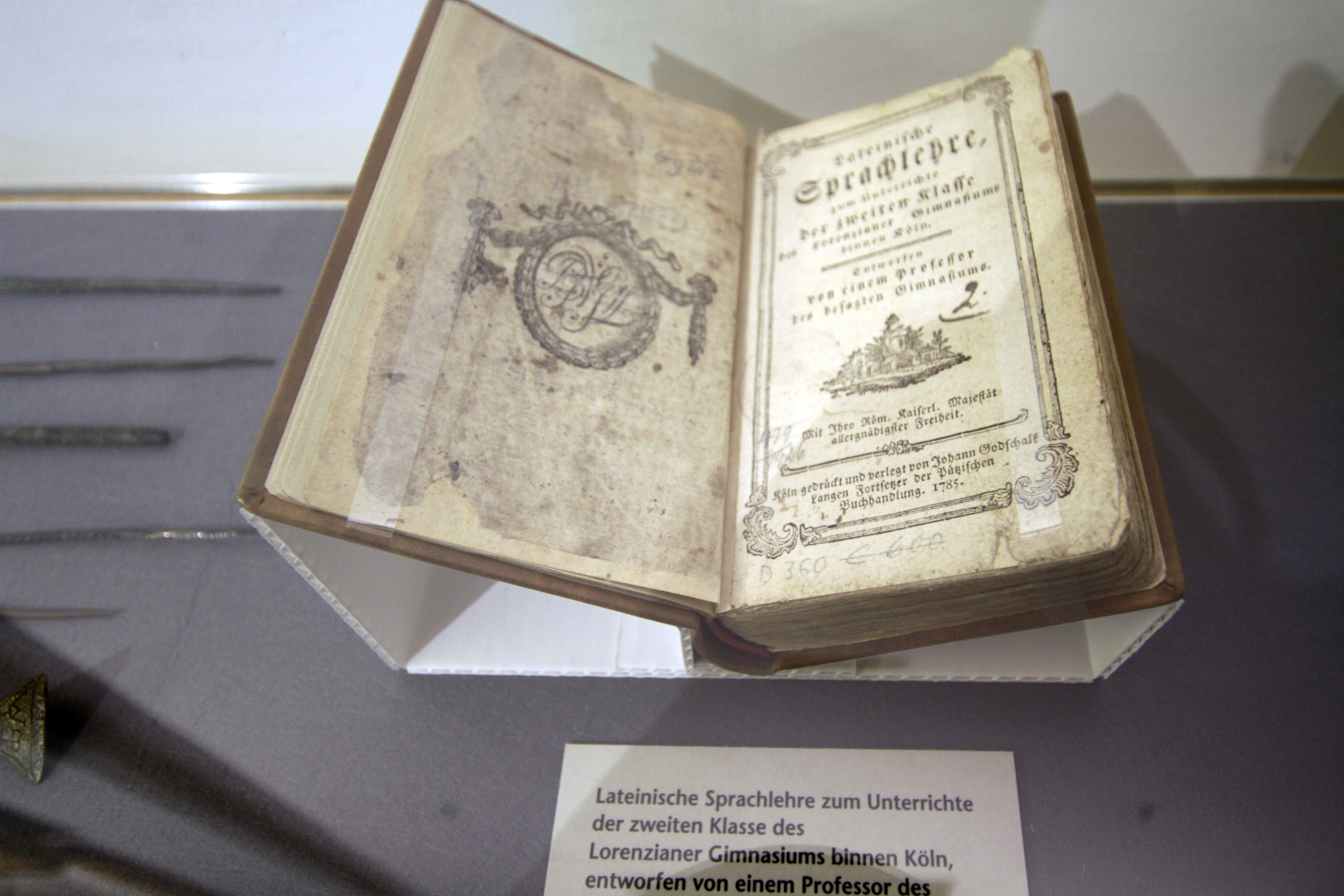 Köln, Gymnasium Laurentianum oder Lorenzianer Gymnasium . Lehrbuch für denLateinunterricht der zweiten Klasse im Jahr 1785